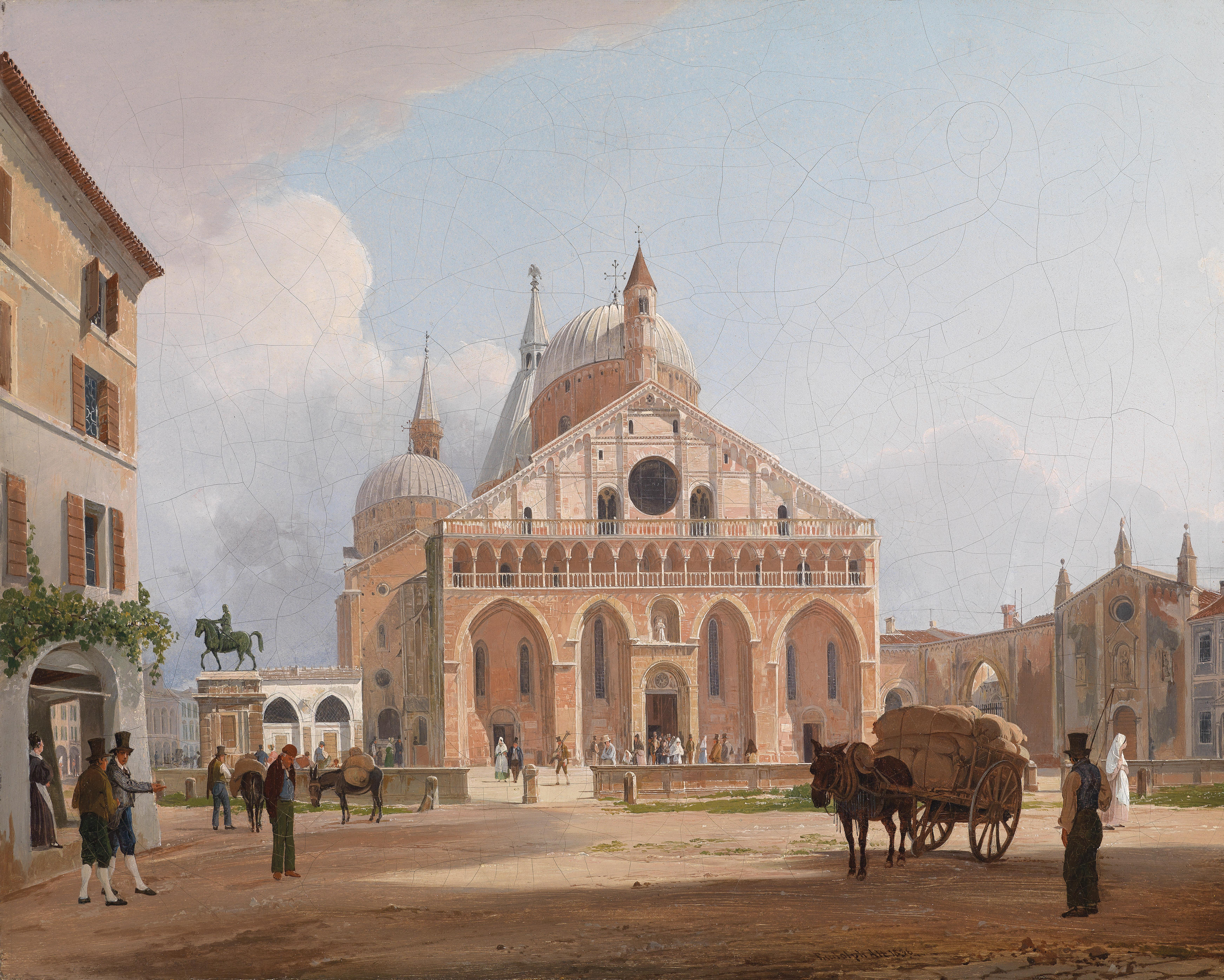 Blick auf die Basilika Sant'Antonio in Padua